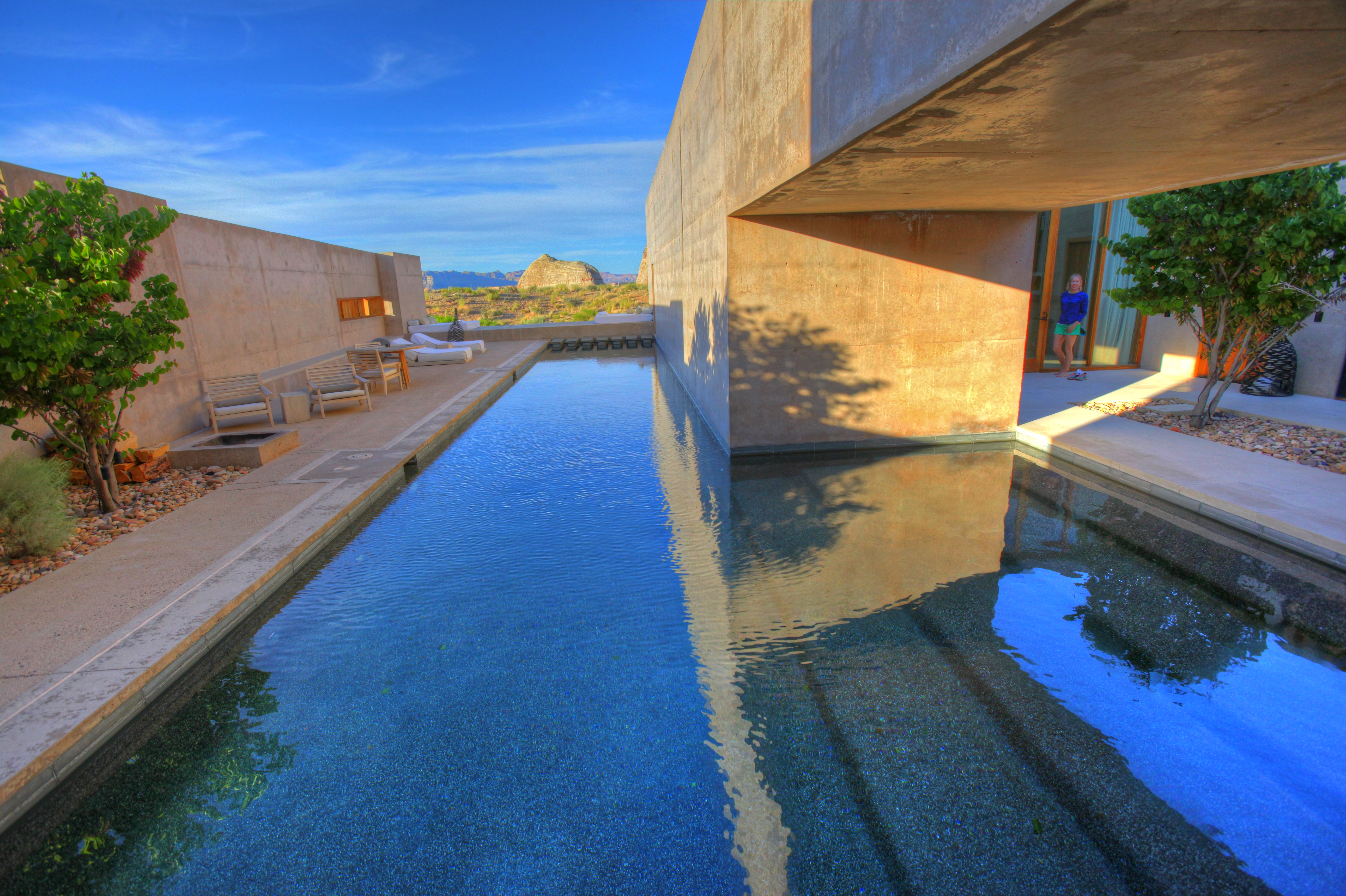 Amangiri Suite. More